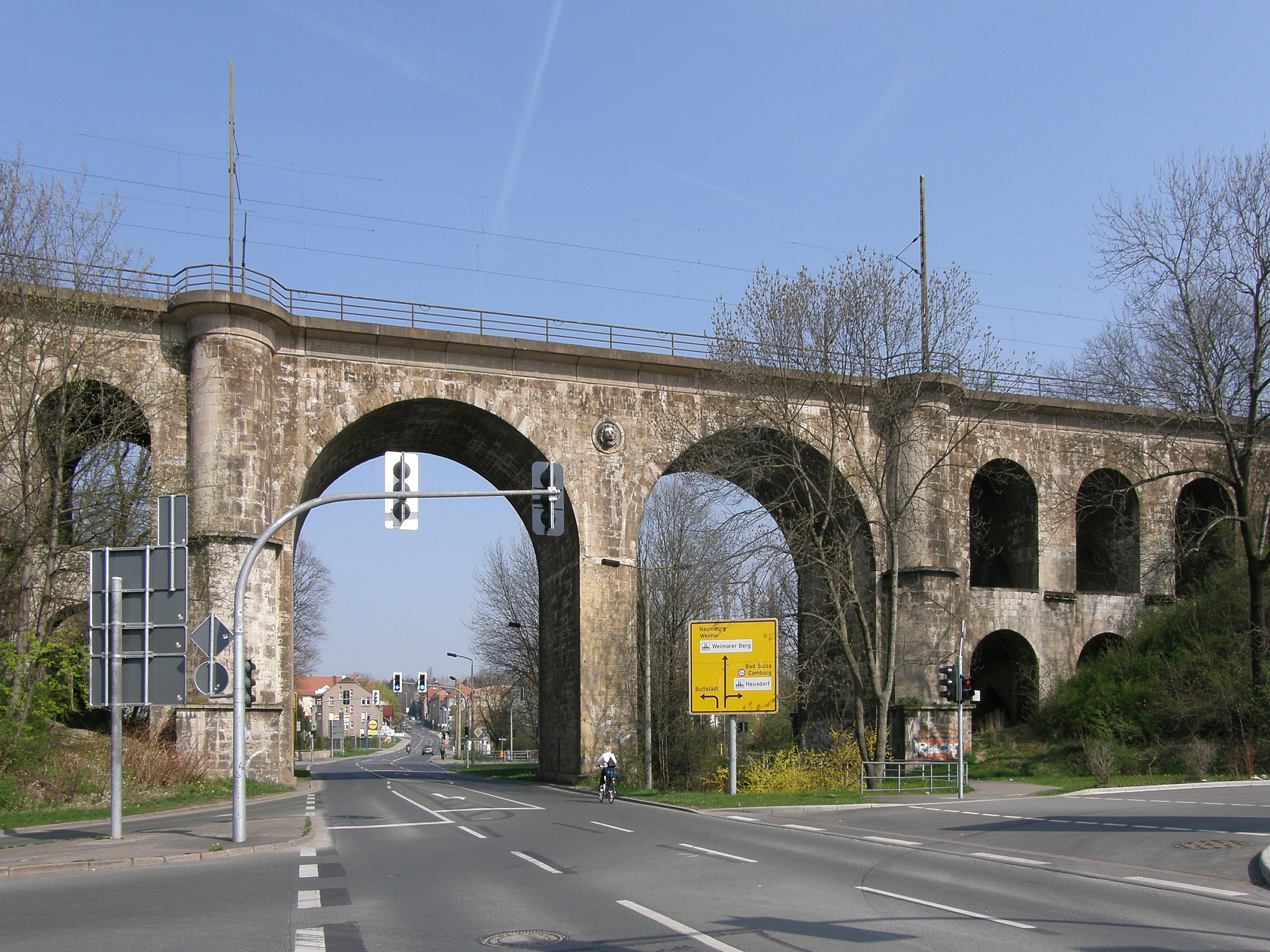 Stadt Apolda - Viadukt, Übersicht rechts